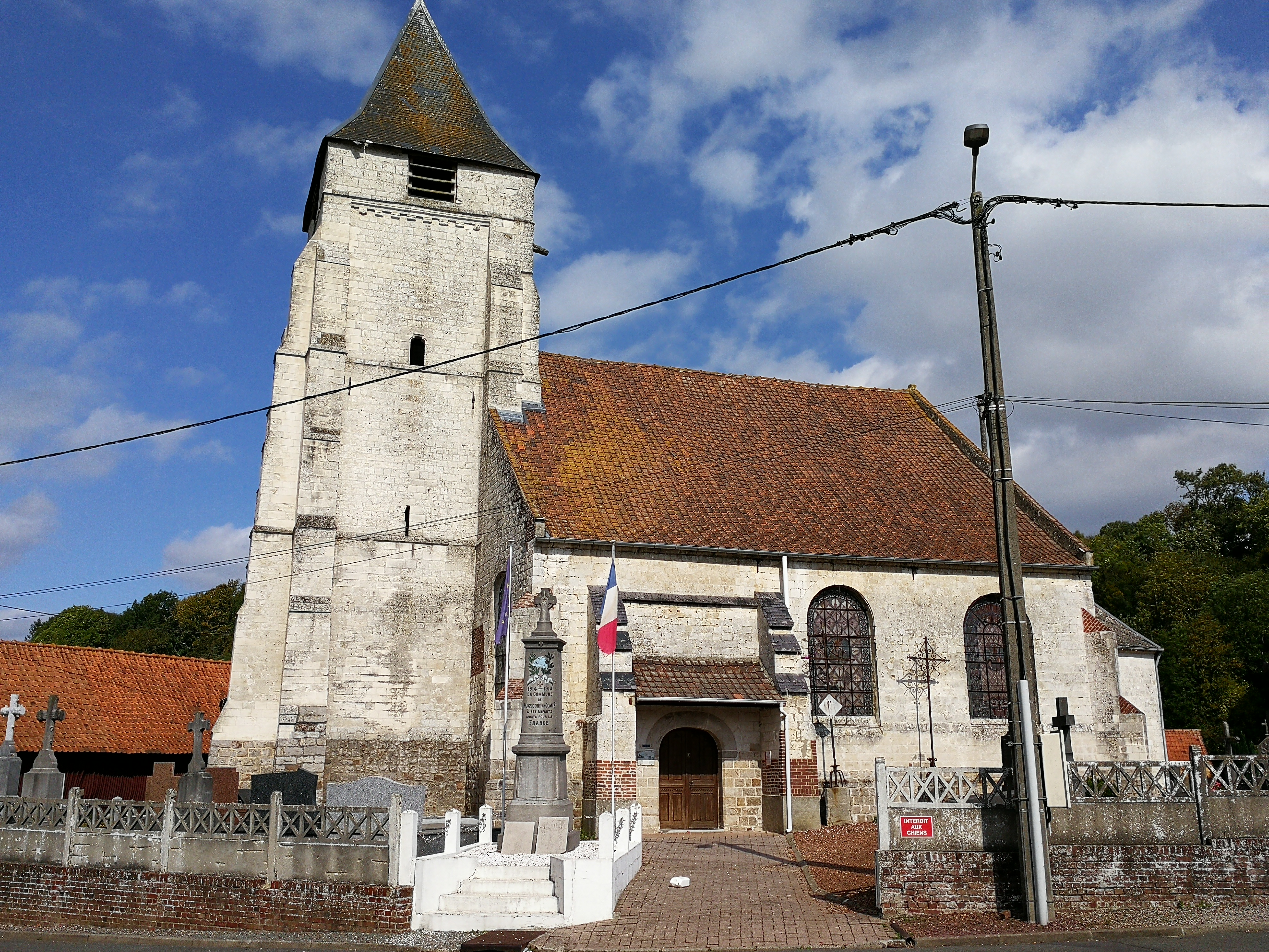 Église Saint Léger de Magnicourt-en-Comte, vue de face. Date du XIVe siècle.